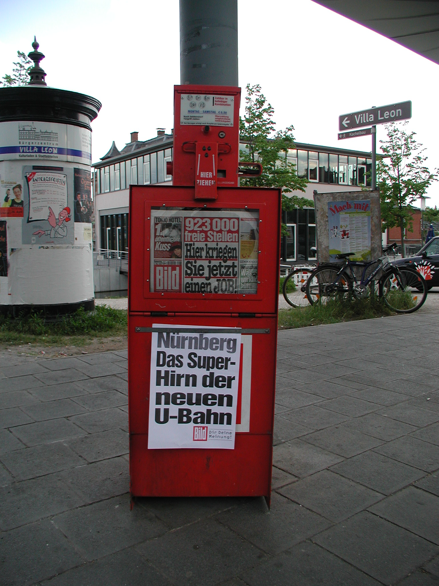 Zeitungsautomat in Nürnberg